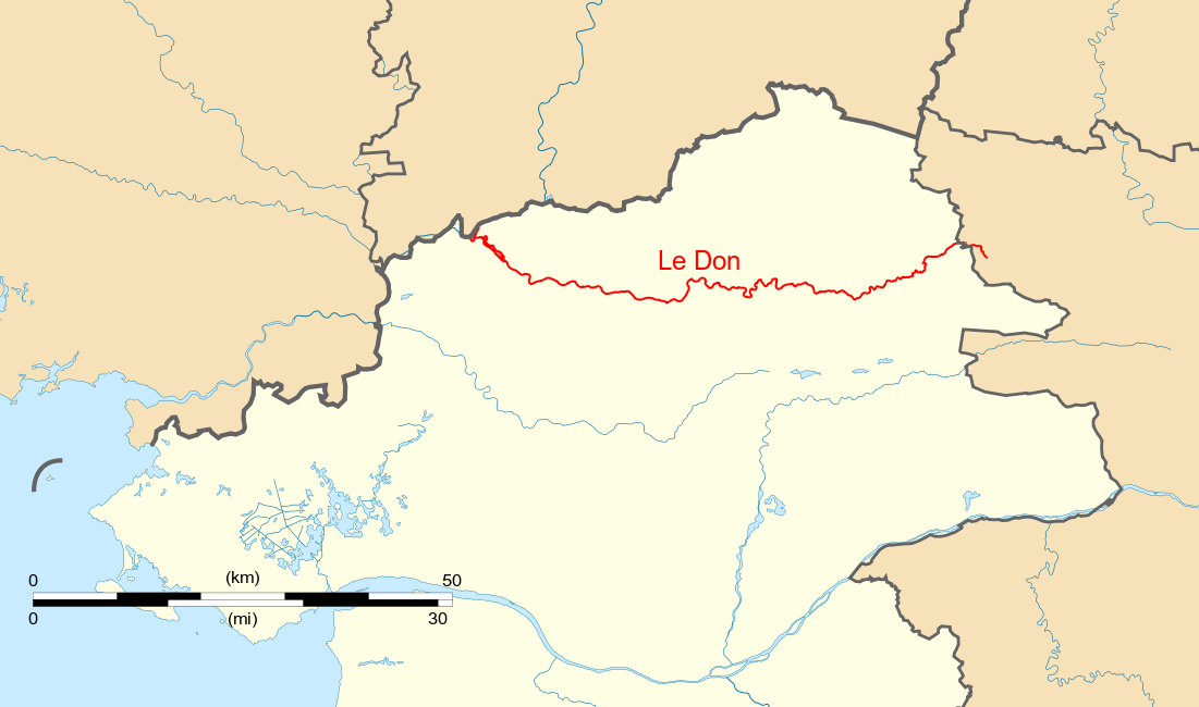 Tracé du parcours du Don, affluent de la Vilaine qui coule dans le nord du département de la Loire-Atlantique.